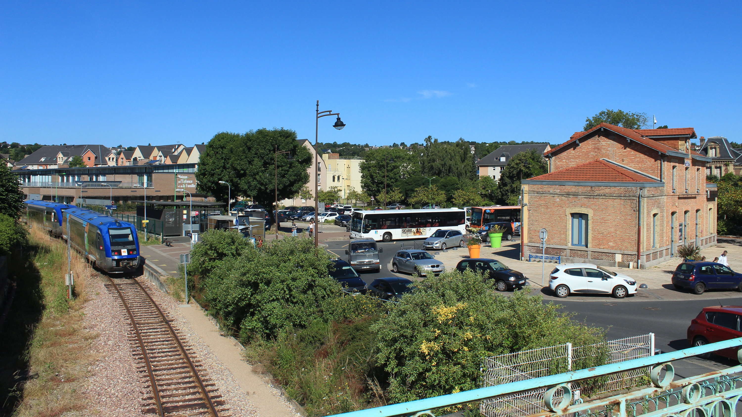 Vue générale sur la gare de Montivilliers, avec à gauche, un train à quai (UM de X 73500), au centre, deux bus urbain (Citaro) et à droite l'ancien bâtiment voyageurs.